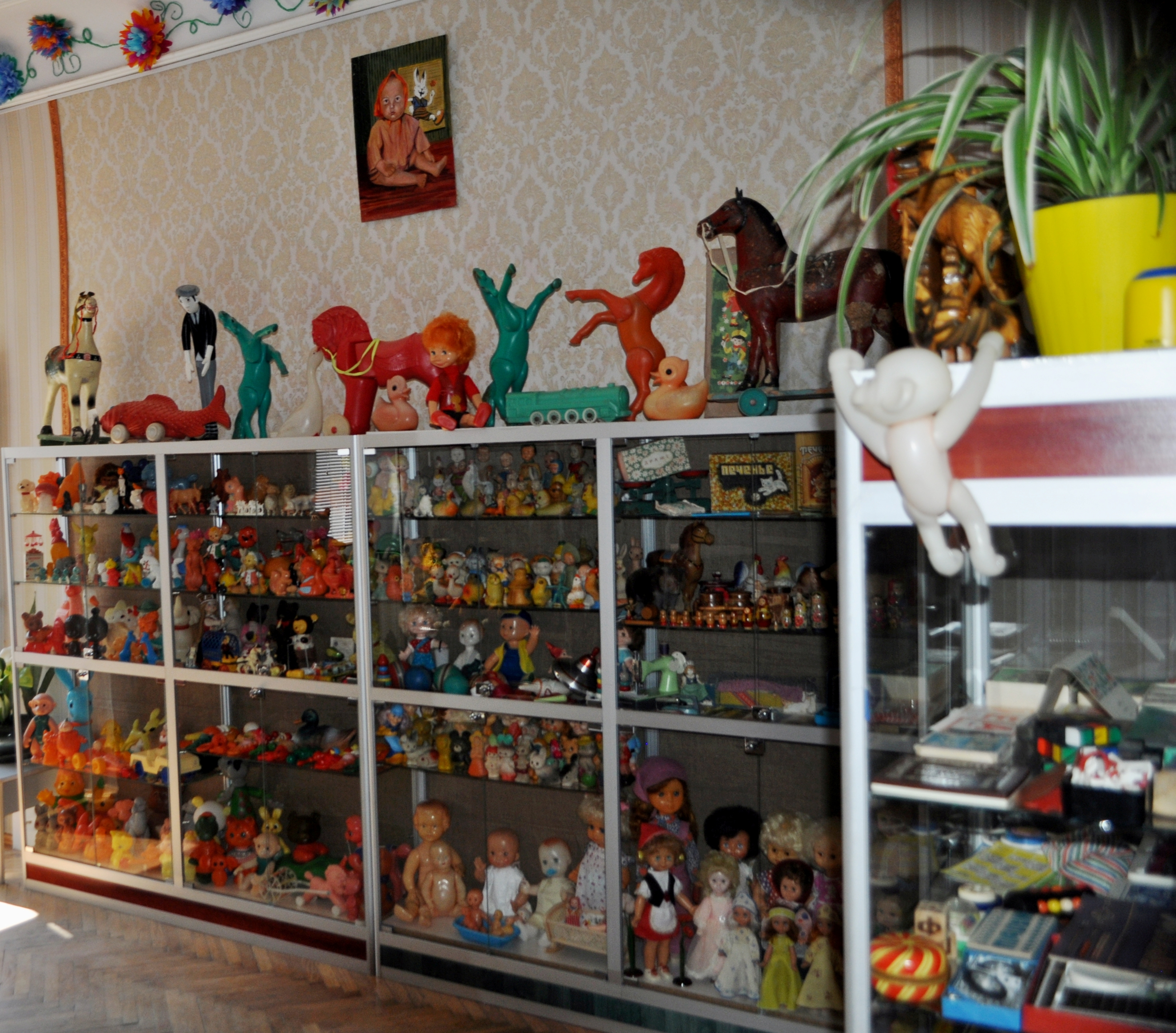 Іграшки 1940-2000 рр.